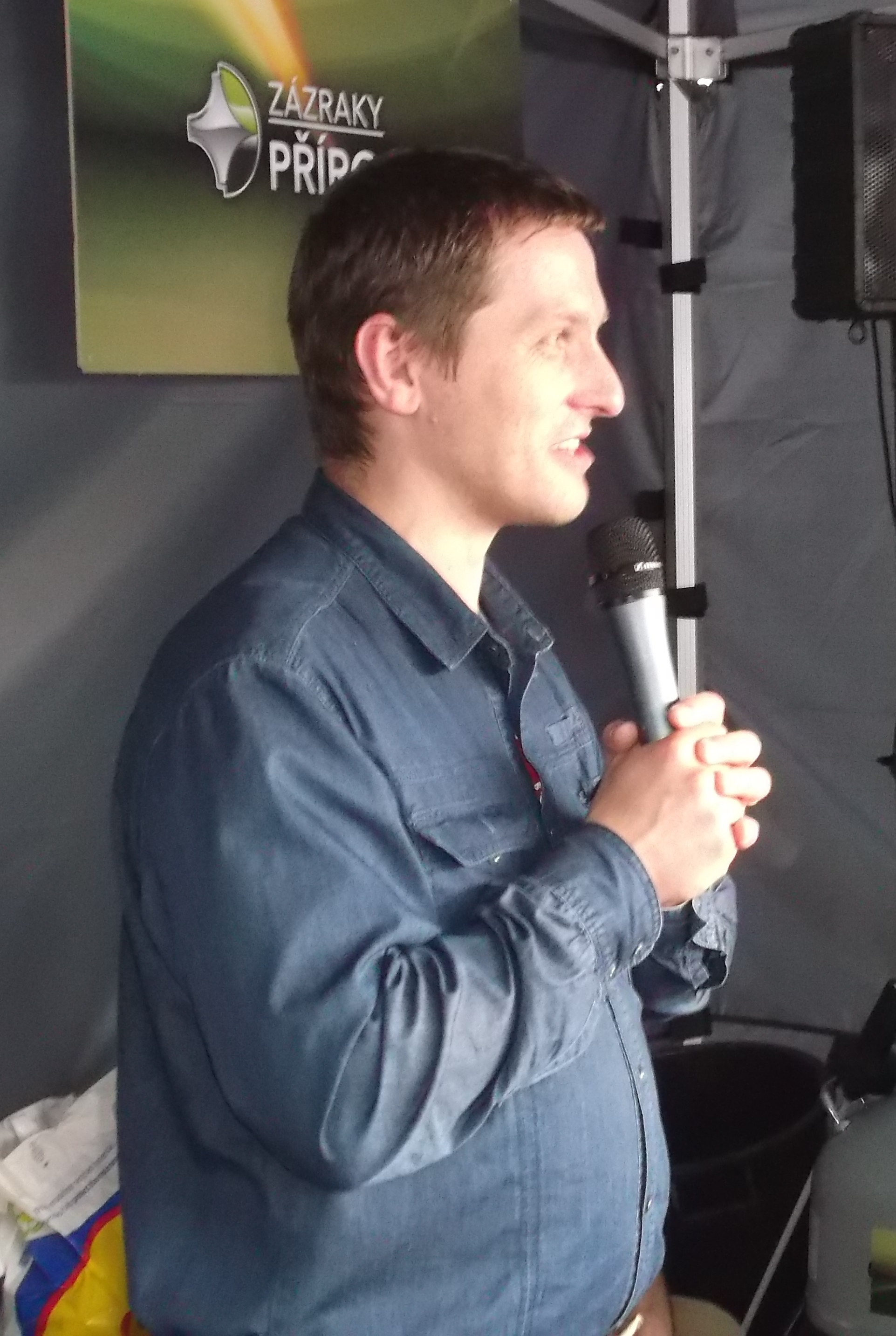 Vladimír Kořen na Dni otevřených dveří České televize v Praze.